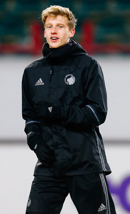 «Копенгаген» опробовал поле «РЖД Арены»